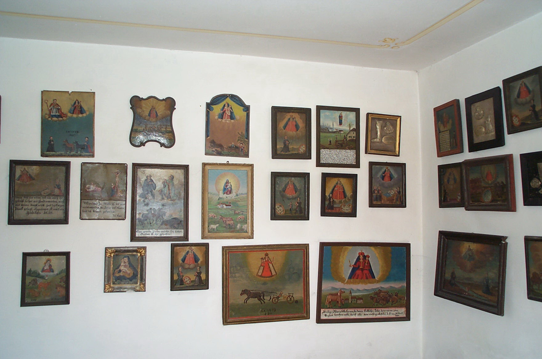 Weihmichl, Stollnried, Kirchstraße 5. Wallfahrtskirche Mariä Himmelfahrt. Saalkirche mit eingezogenem Chor, Anlage des frühen 14. Jahrhunderts, Verlängerung des Schiffes nach Westen 1847. Zahlreiche Votivtafeln unter der Empore, die teilweise aus dem 18. Jh. stammen zeugen von Gebetserhörungen und Hilfe bei landwirtschaftlichen und handwerklichen Unfällen durch die Fürbitte der Jungfrau Maria.